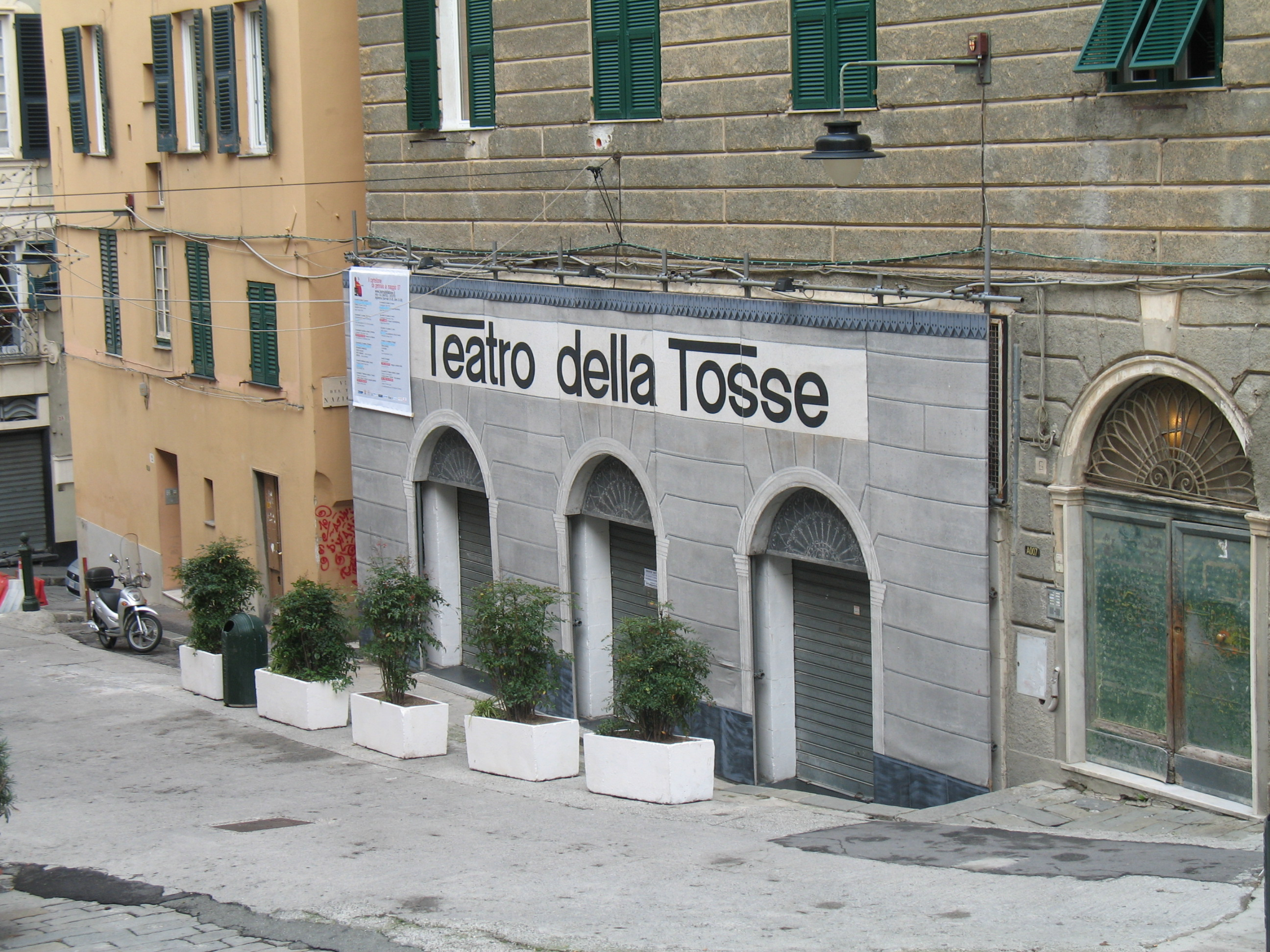 Genova - Teatro della Tosse, piazza Renato Negri